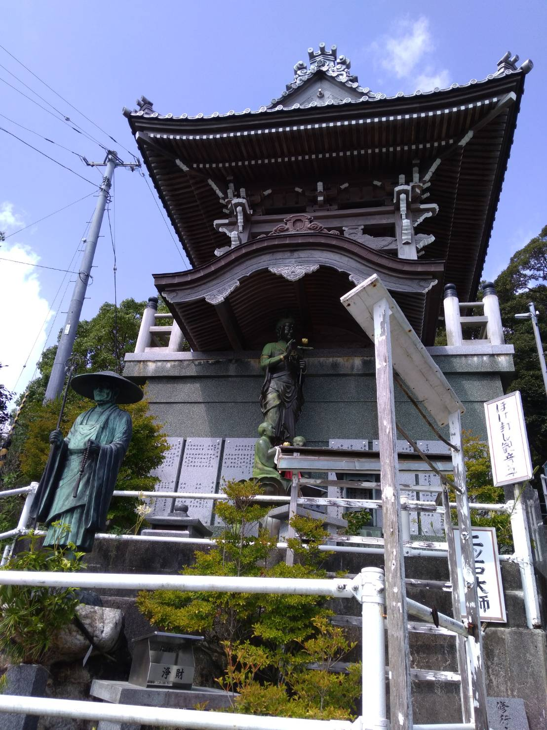 Vue sur les statues